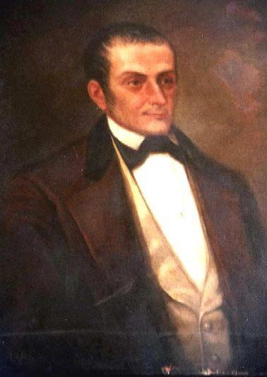 Andrés Reyes y Buitrón. Presidente interino del Perú en 1831